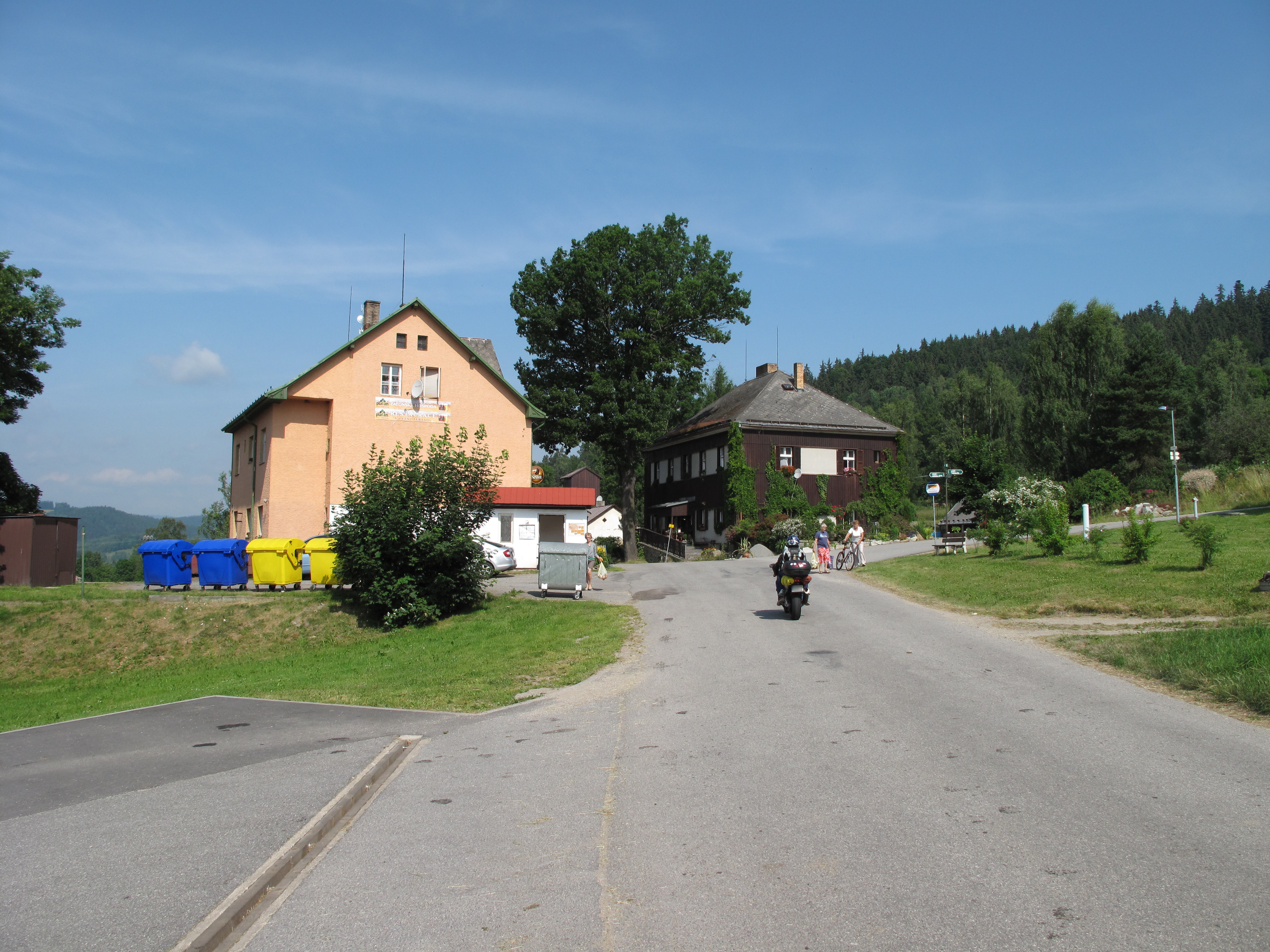 Náves v Zátoni. Okres Prachatice, Česká republika.